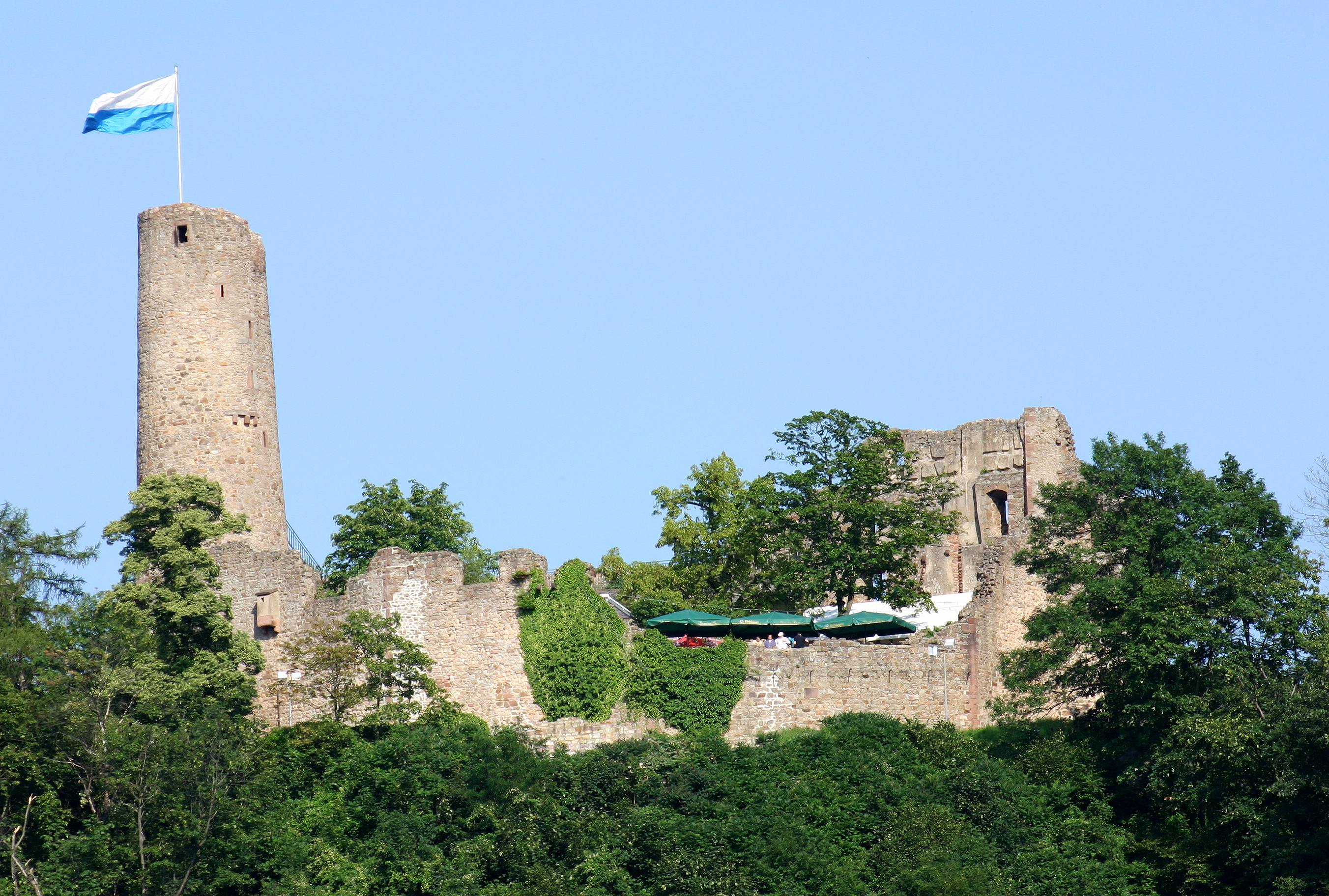 Burg Windeck, von Weinheim aus gesehen